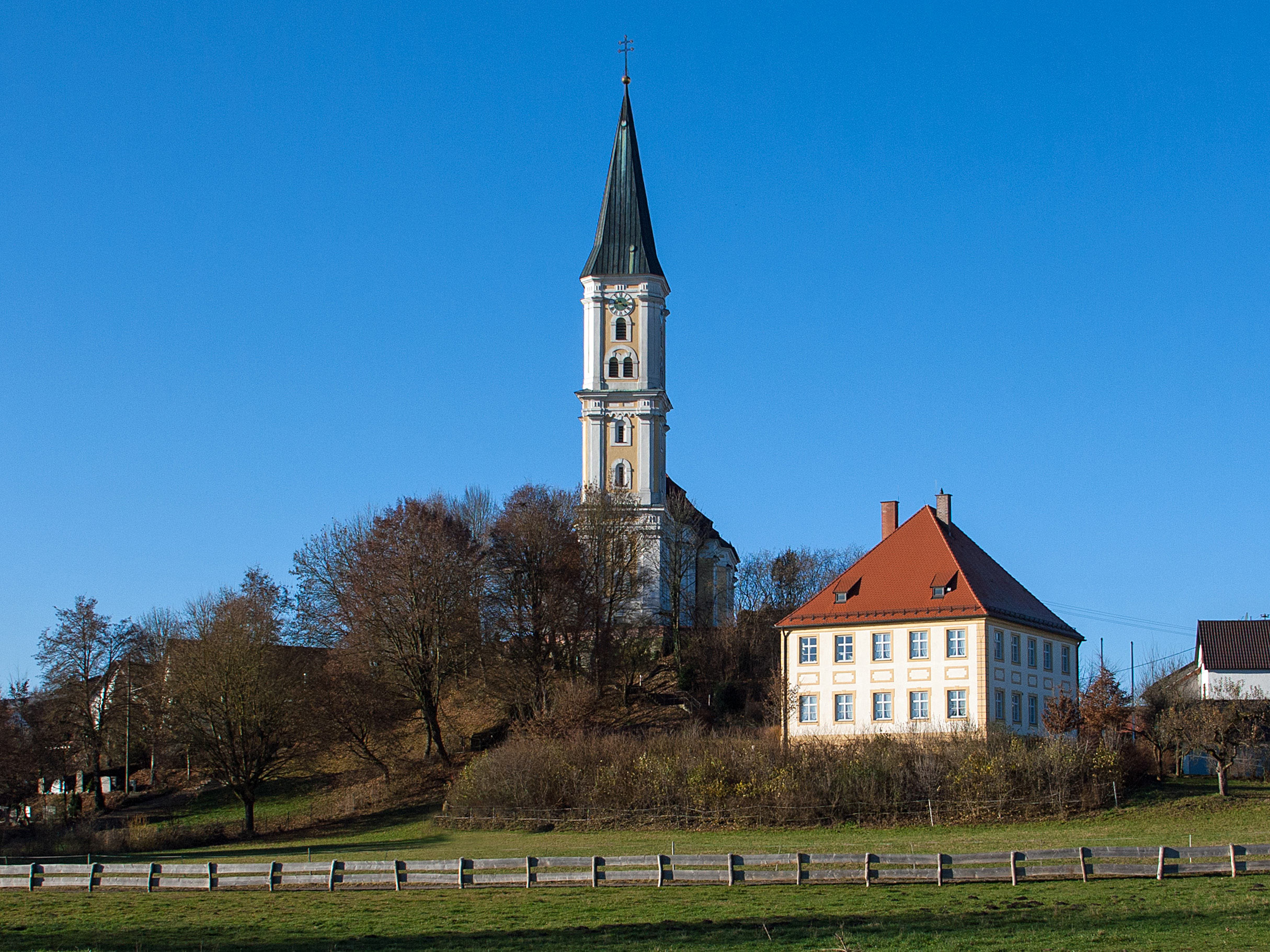 Pfarrkirche Heilig Kreuz, Breitenthal (Schwaben). Ansicht von Kirche und Pfarrhaus von Osten